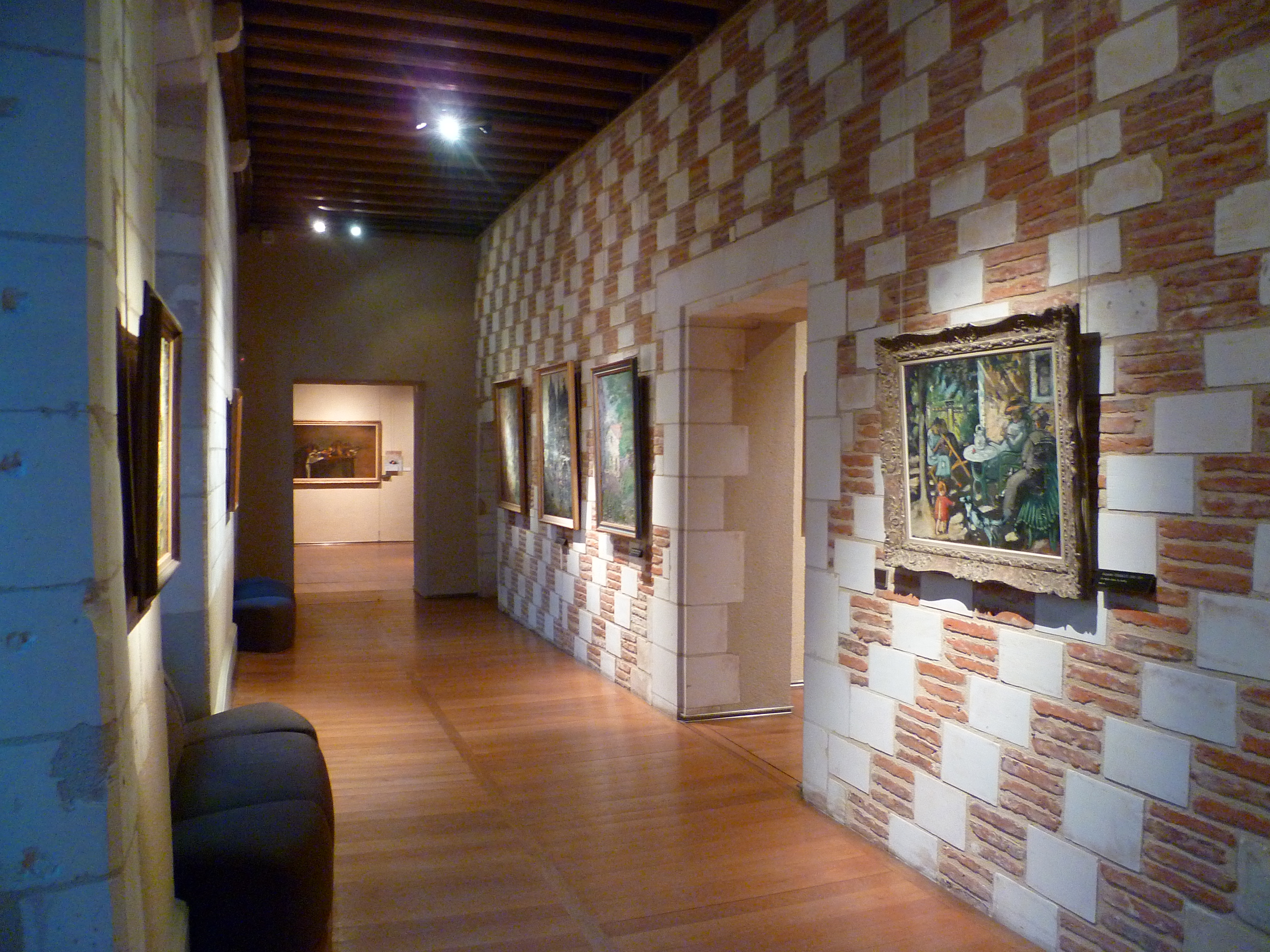 Troyes (Aube, France) : Musée d'art moderne.